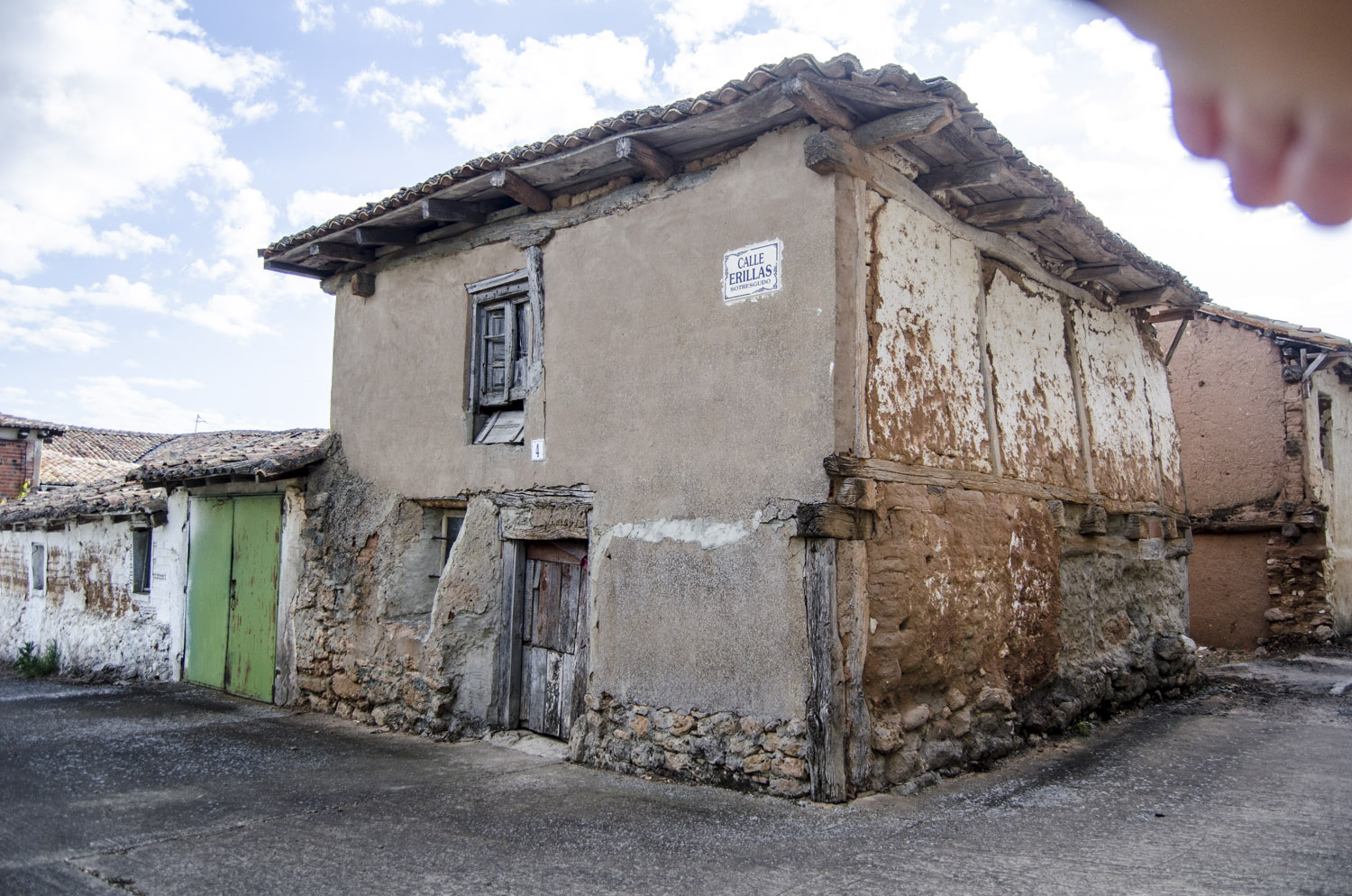 Arquitectura tradicional. Sotresgudo. Burgos. España.